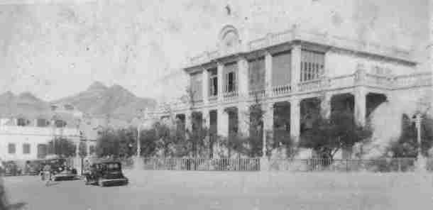 Legenda no verso da foto: "O Palácio do Governador de Cabo Verde, situado em Mindelo, [Ilha de] São Vicente. Luís Henriques. 1 de Maio de 1942".